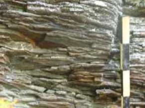 ანტიკური ხანის რკინის მეტალურგიული საწარმო, ძვ.წ. VIII-VI საუკუნეები (სოფ. ლახამი)